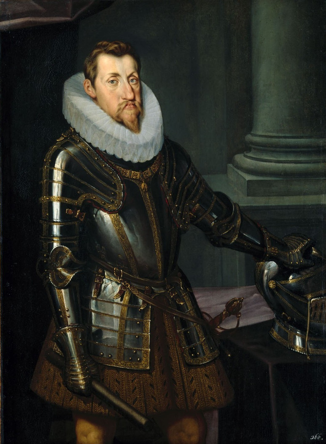 Porträt.-Gemälde